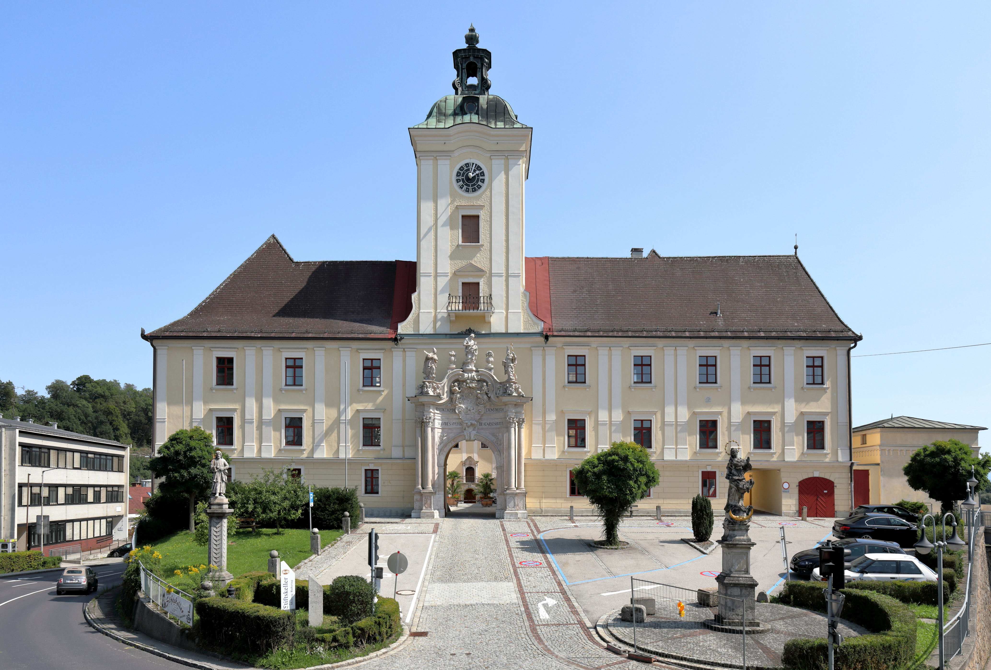 Vorplatz und Westflügel des Benediktinerstiftes mit Torturm und viersäuligem Marmorportal in der oberösterreichischen Marktgemeinde Lambach. Die stattliche langgestreckte Anlage auf einer Bodenwelle neben der Traun hat ihr heutiges Erscheinungsbild weitgehend durch die Bautätigkeit zwischen Mitte des 17. Jahrhunderts und Anfang des 18. Jahrhunderts erhalten. Gegründet wurde das Stift 1046 für weltliche Chorherren und 1056 als Benediktinerabtei. Beim Bayerneinfall 1233 wurde Kloster und Kirche großteils zerstört.